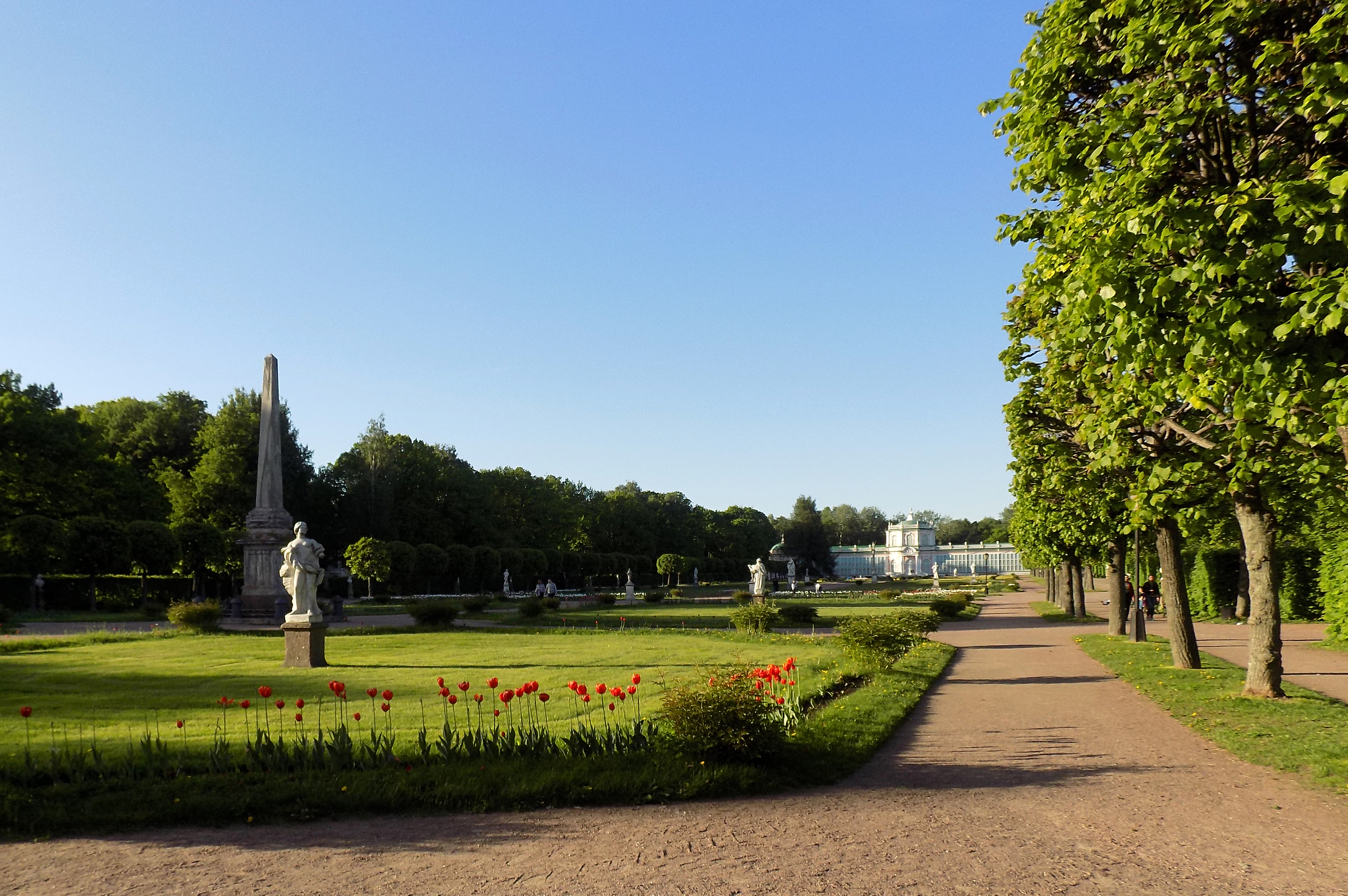 Кусково: Восточный округ, Москва This image is related to the protected area of Russia number 7710150